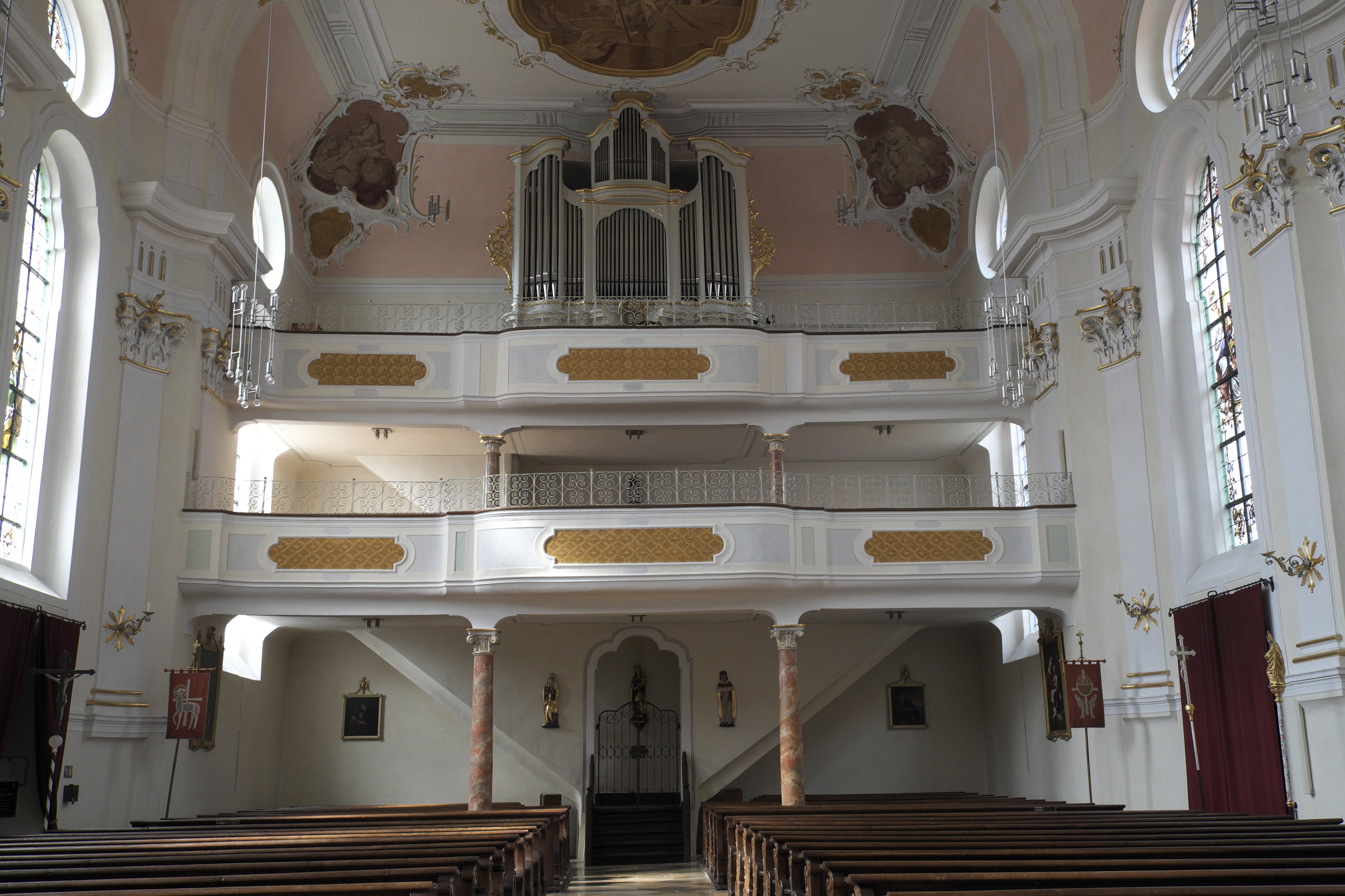 Katholische Pfarrkirche St. Johannes Baptist in Dischingen (Landkreis Heidenheim/Baden-Württemberg), Doppelempore, Orgel von Joseph Hoeß von 1782